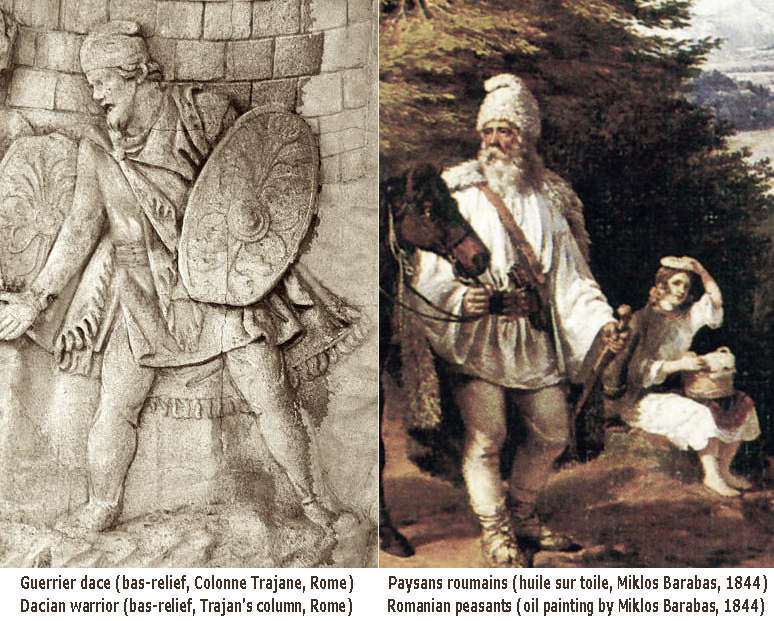 Dac (columna lui Traian, Roma) și Român (tablou de Miklos Barabas, 1844)